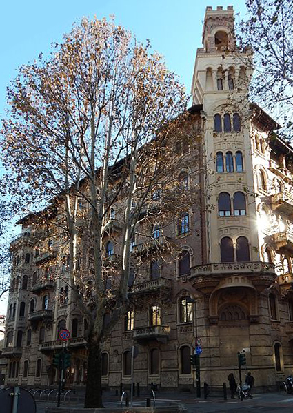 Una veduta della Casa della Vittoria (Torino)